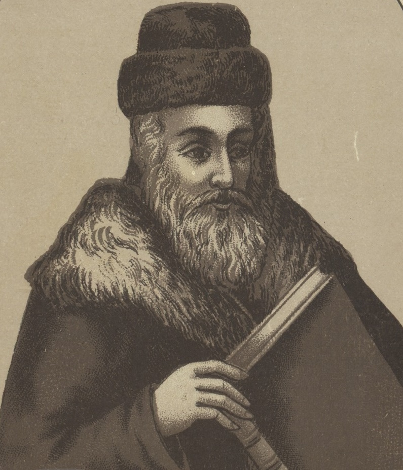 רבי עקיבא איגר